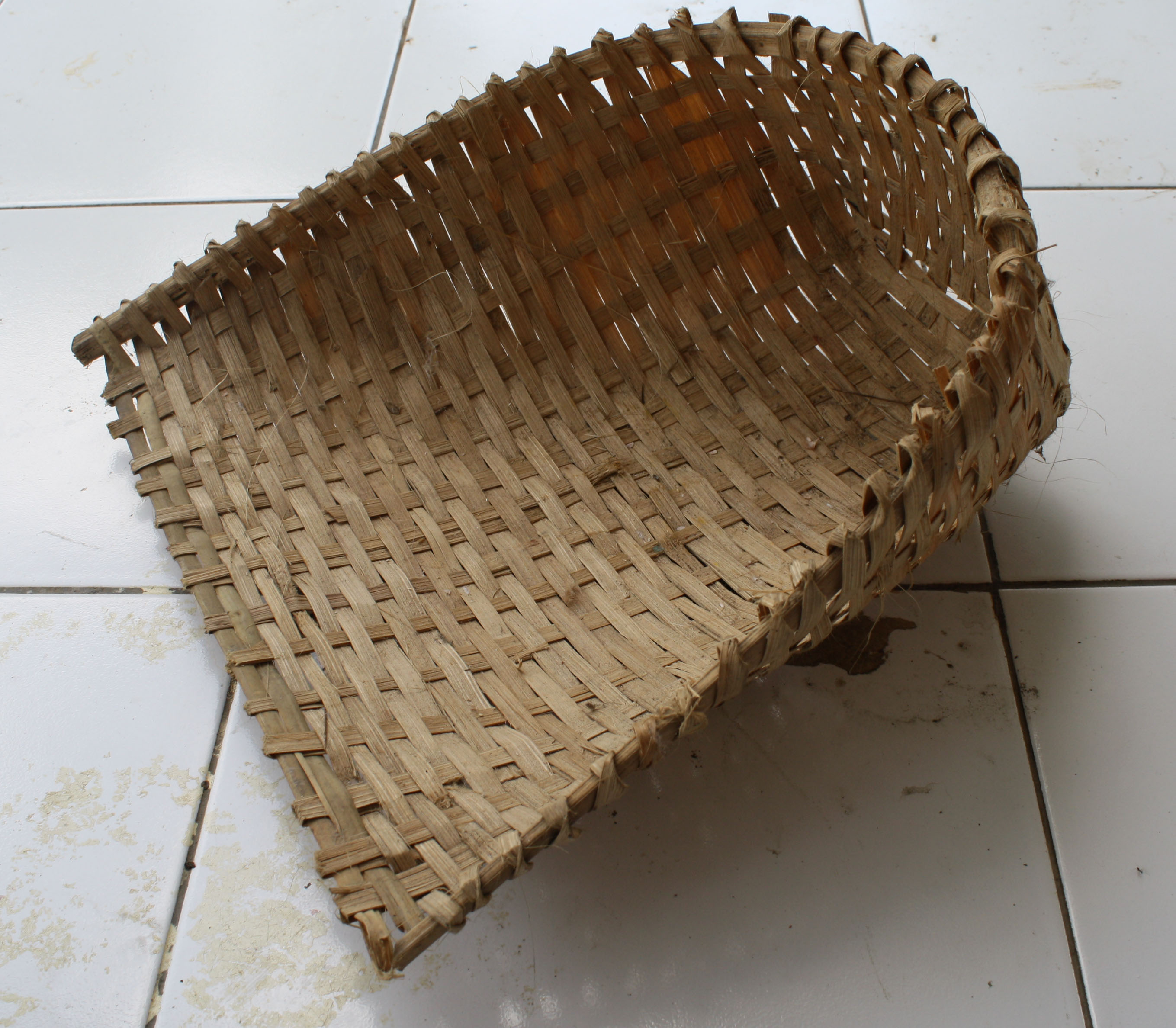 Ikrak adalah salah satu alat untuk membuang sampah pada saat menyapu